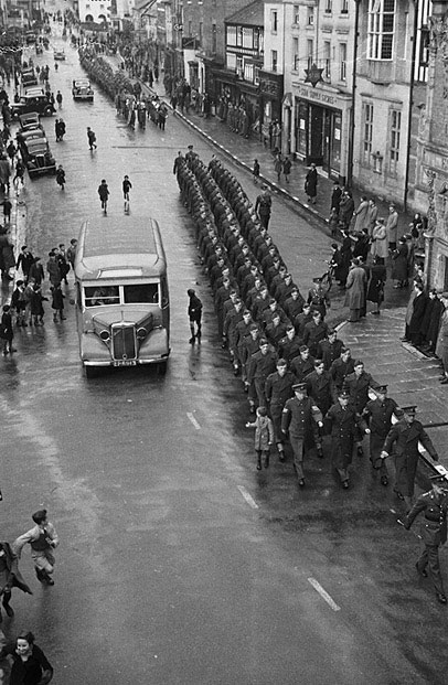 Teitl Cymraeg/Welsh title: Gorymdaith Diwrnod y Caedodoad, Drenewydd Ffotograffydd/Photographer: Geoff Charles (1909-2002) Dyddiad/Date: 16/11/1940 Cyfrwng/Medium: Negydd ffilm / Film negative Cyfeiriad/Reference: (gcc02459) Rhif cofnod / Record no.: 3472430 Rhagor o wybodaeth am gasgliad Geoff Charles yn Llyfrgell Genedlaethol Cymru More information about the Geoff Charles Collection at the National Library of Wales Mae ffotograffau Geoff Charles hefyd yn rhan o Broject Europeana Libraries Geoff Charles' photographs also form part of the Europeana Libraries Project